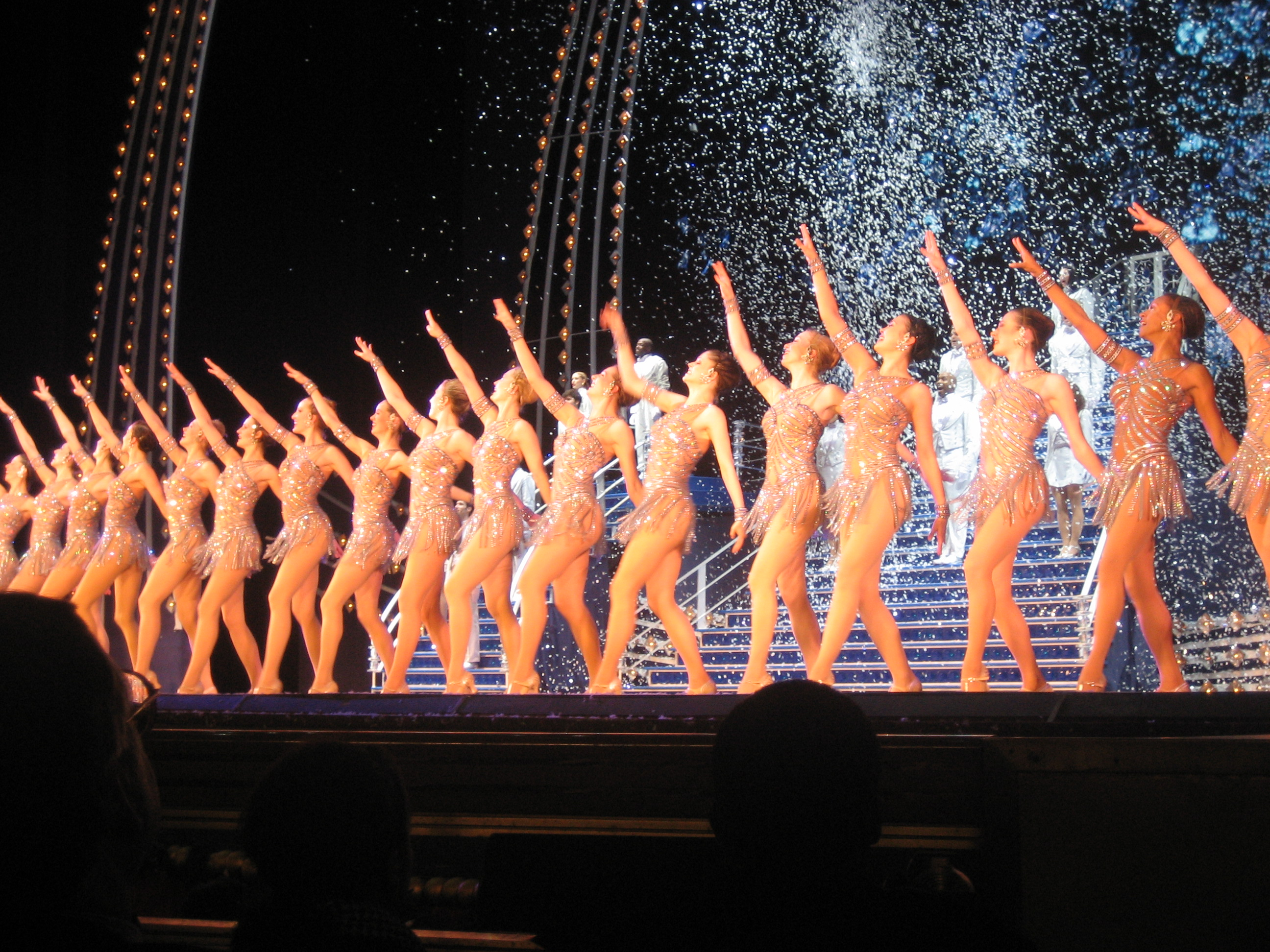 Rockettes